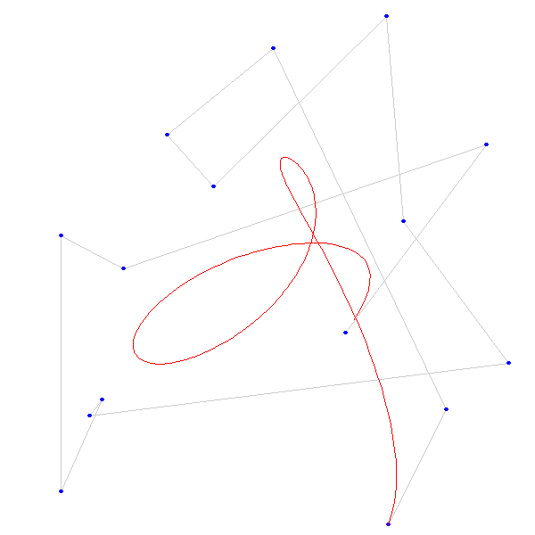 Przykładowa krzywa Beziera 14. stopnia.